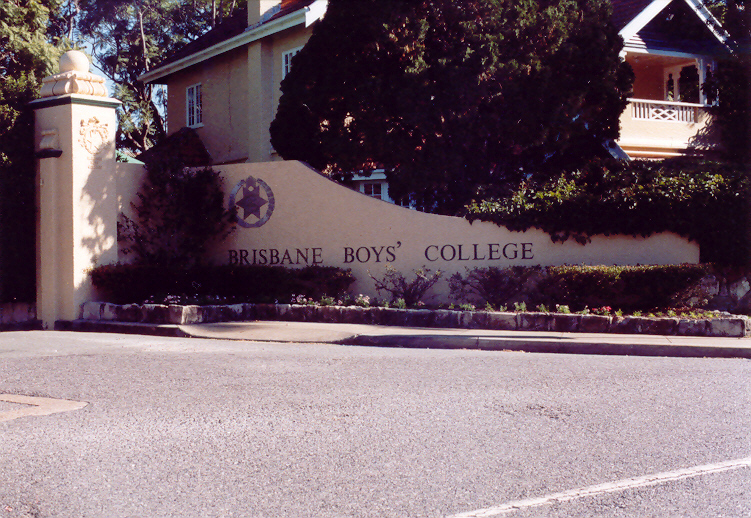 Der alte Haupteingang zum Toowong Campus.